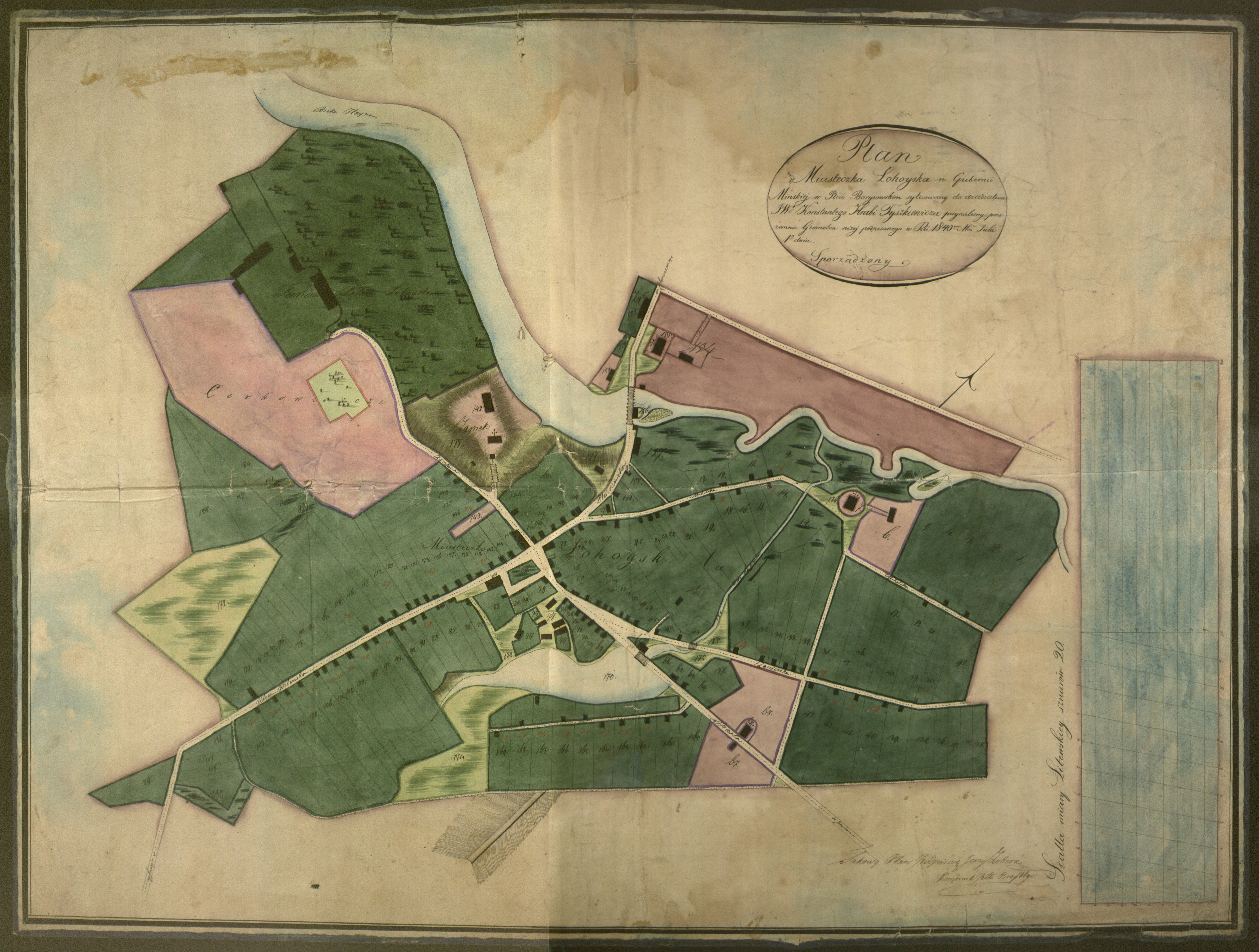 Беларуская (тарашкевіца): Лагойск (Łahojsk). Плян мястэчка